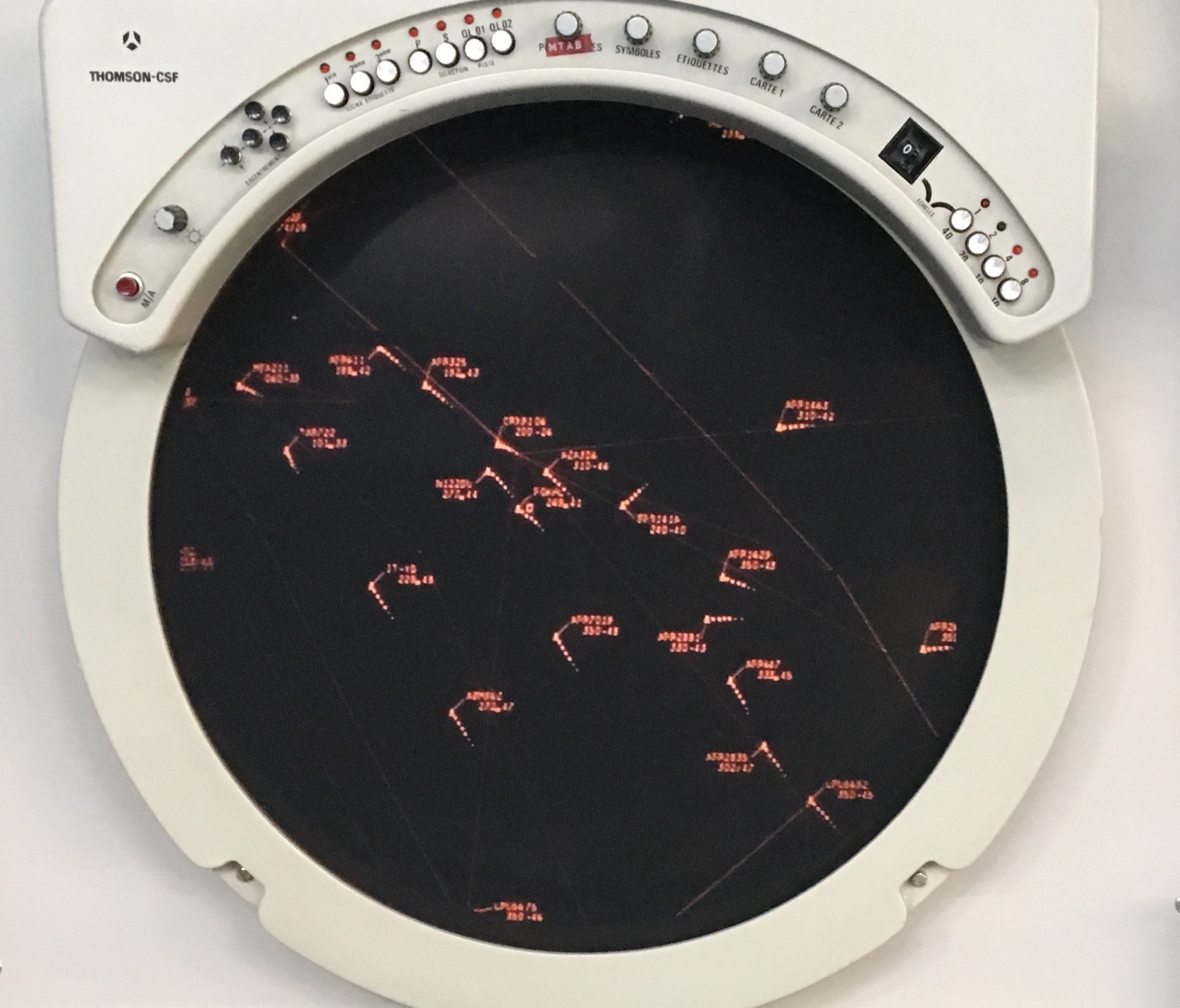 Ecran radar aéronautique